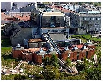 Biblioteca E.R. Caianiello, Università di Salerno